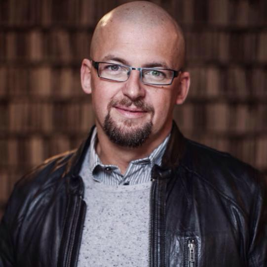 Johannes Amritzer